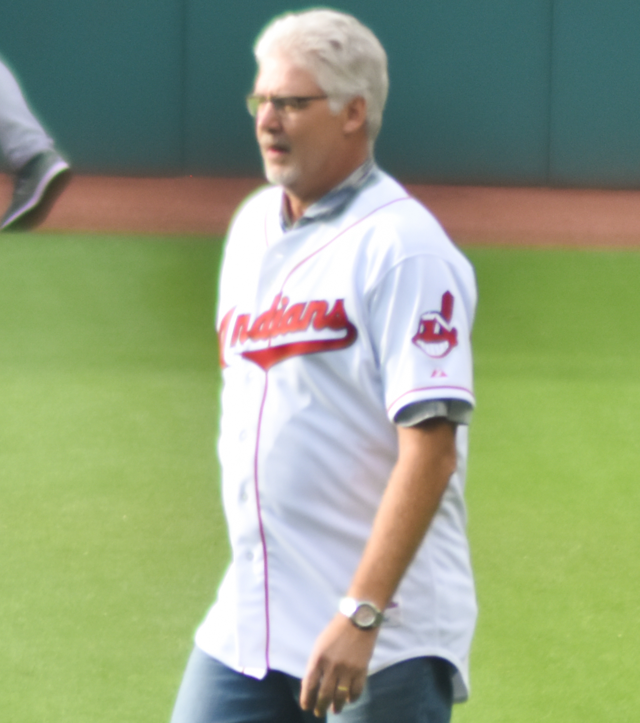 Paul Assenmacher